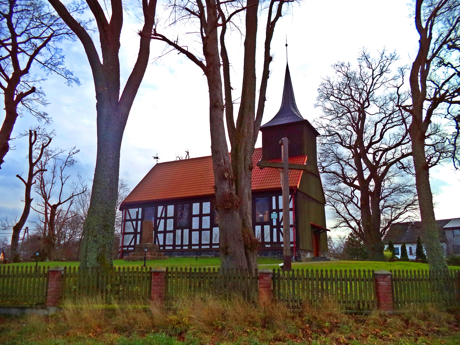 Bukowin Nr. 15, Kirche